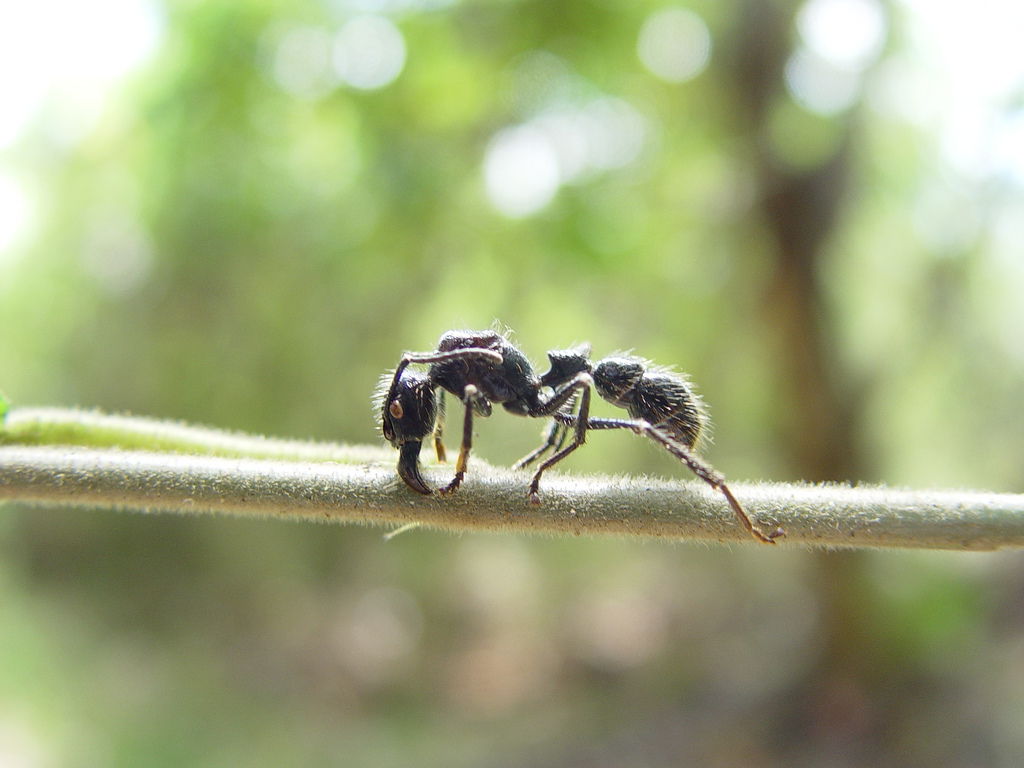 A bullet ant.